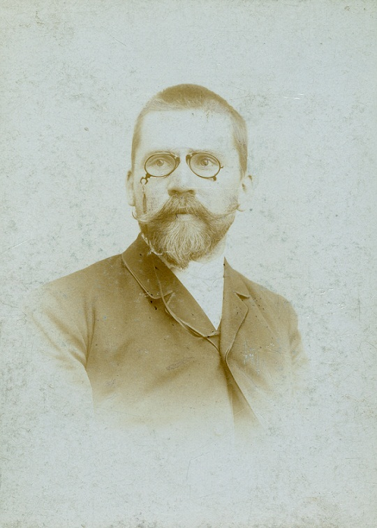 Jaroslav Věšín, český malíř, profesor